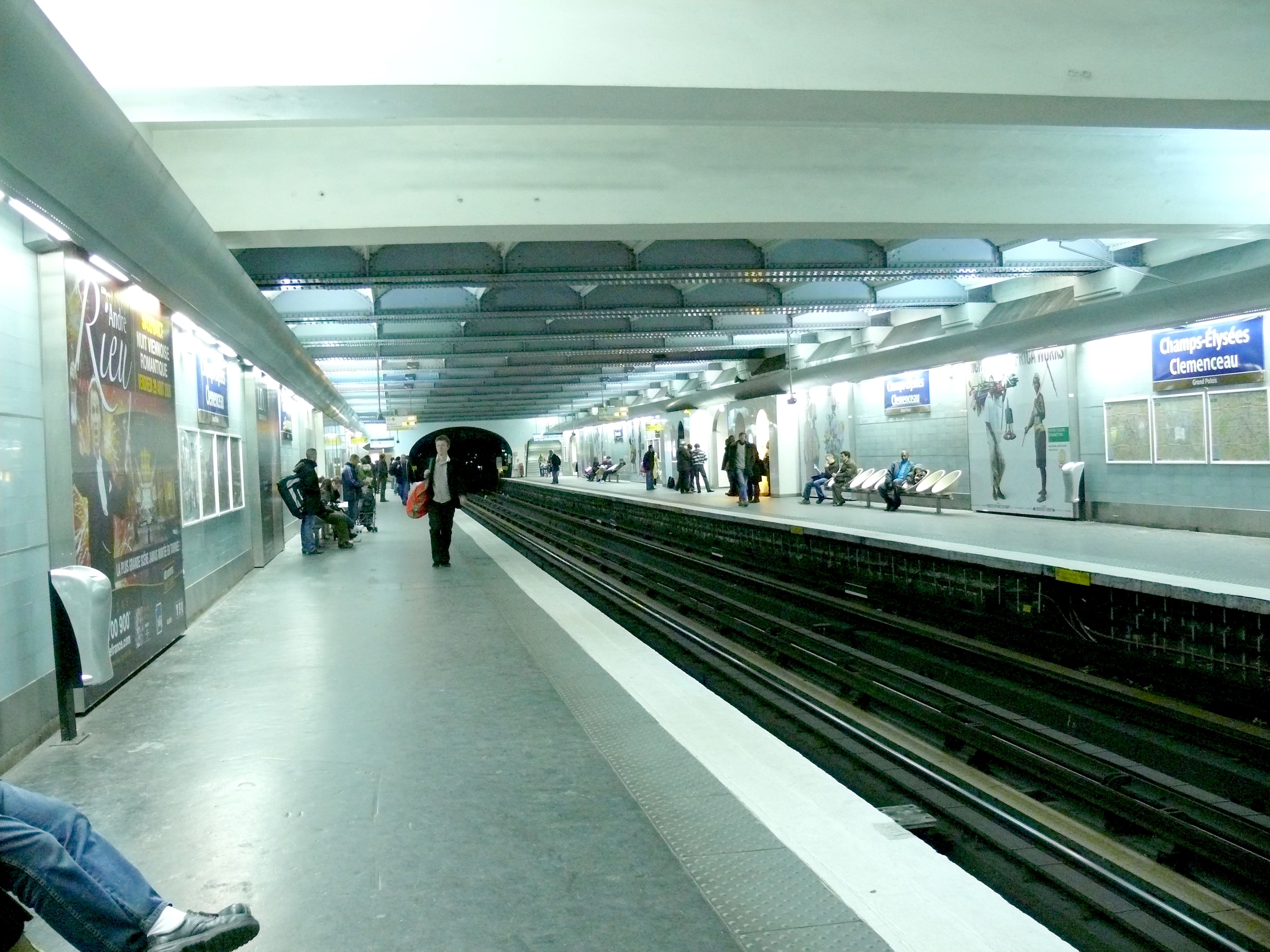 Métro de Paris (France) - ligne 1 - Station Champs-Elysées - Clemenceau - Février 2008